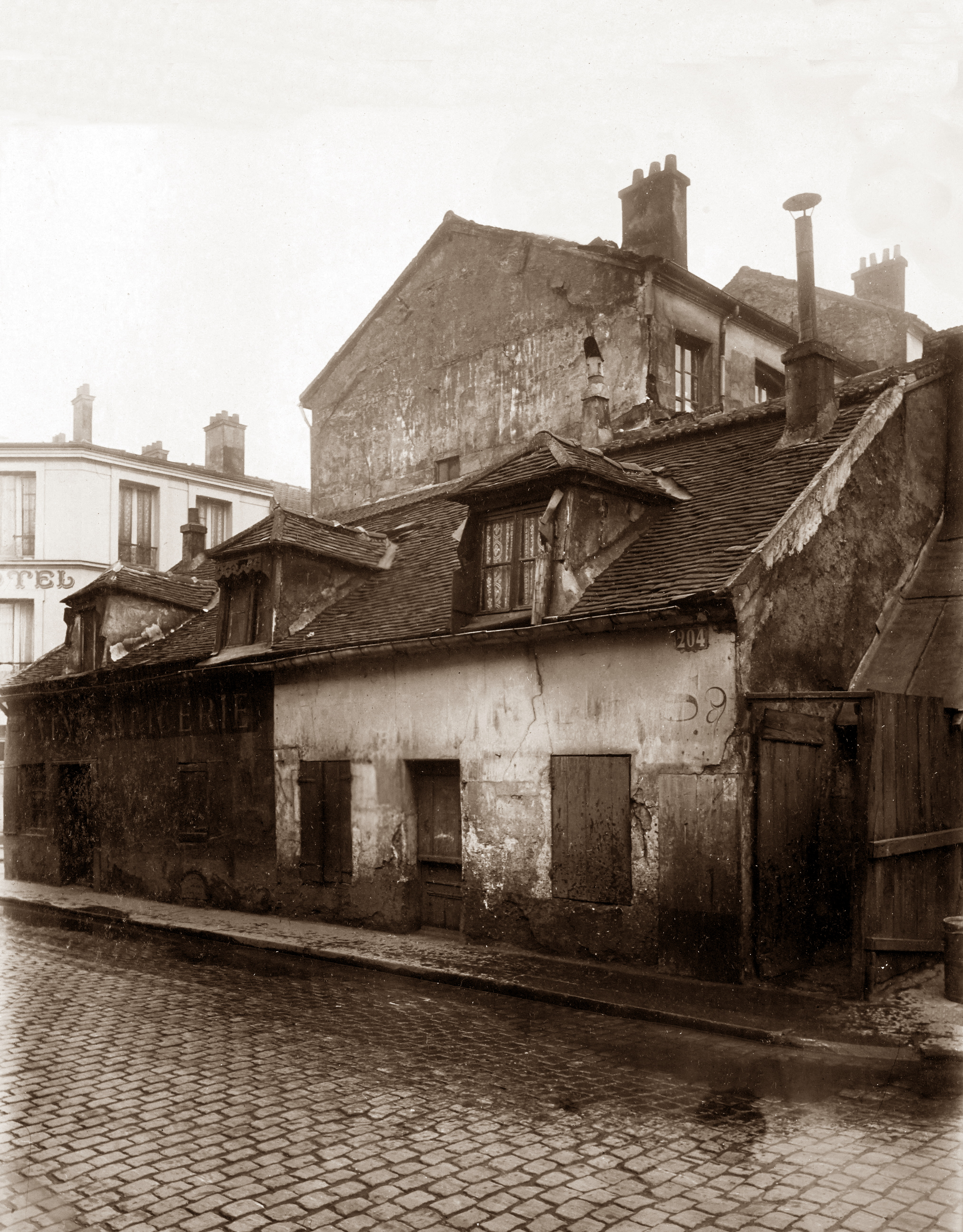 204 Rue du Chateau des rentiers. N ° Atget : 6531. 1925. Photographie positive sur papier aristotype d'après négatif sur verre au gélatinobromure ; 22,7 x 17,7 cm (épr.). [Cote : BNF - Est. Eo 109b bte 21 ; n ° micr. T041325] Opaline 022460 [Image fixe numérisée]